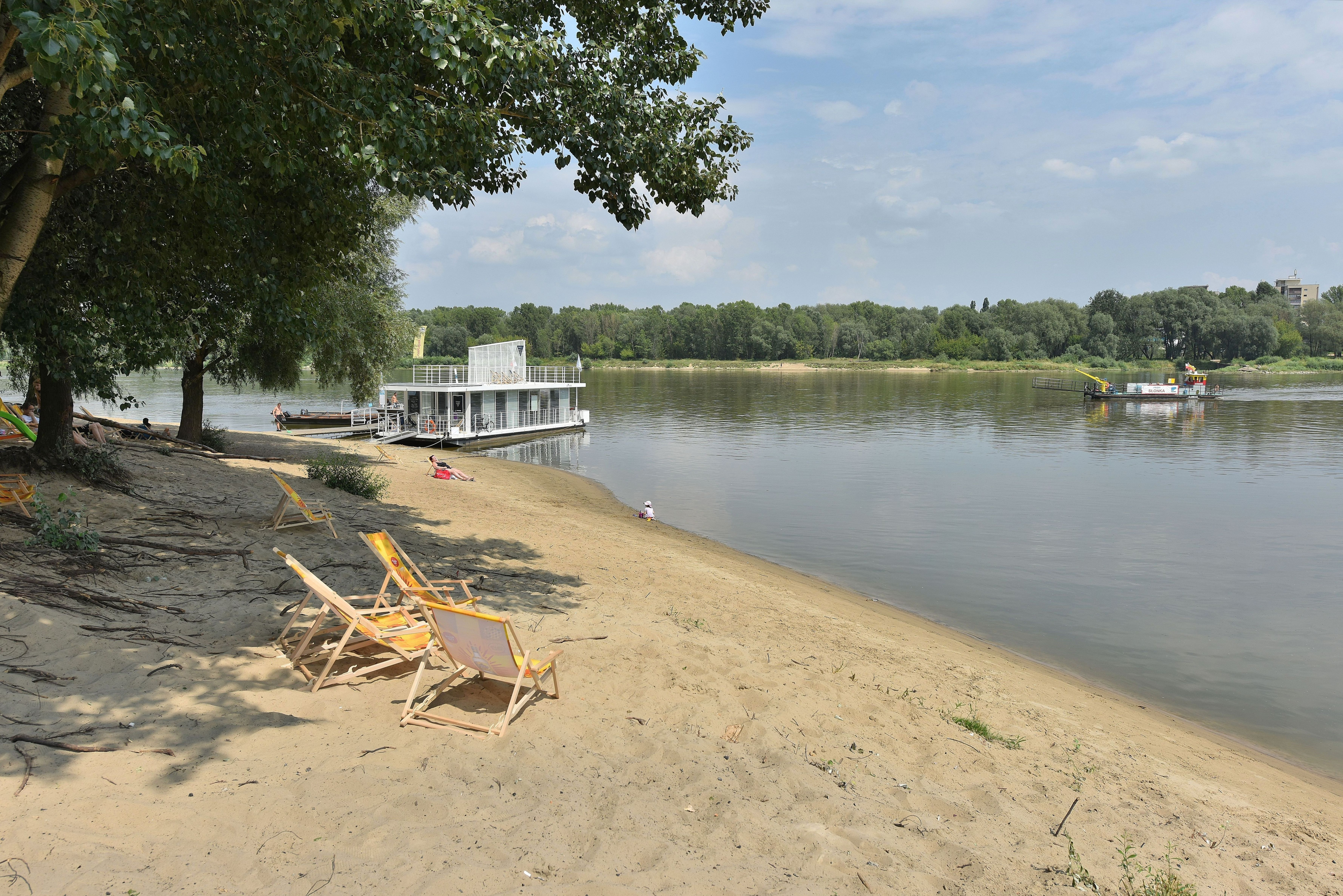 Plaża przy Płycie Desantu Czerniakowskiego w Warszawie